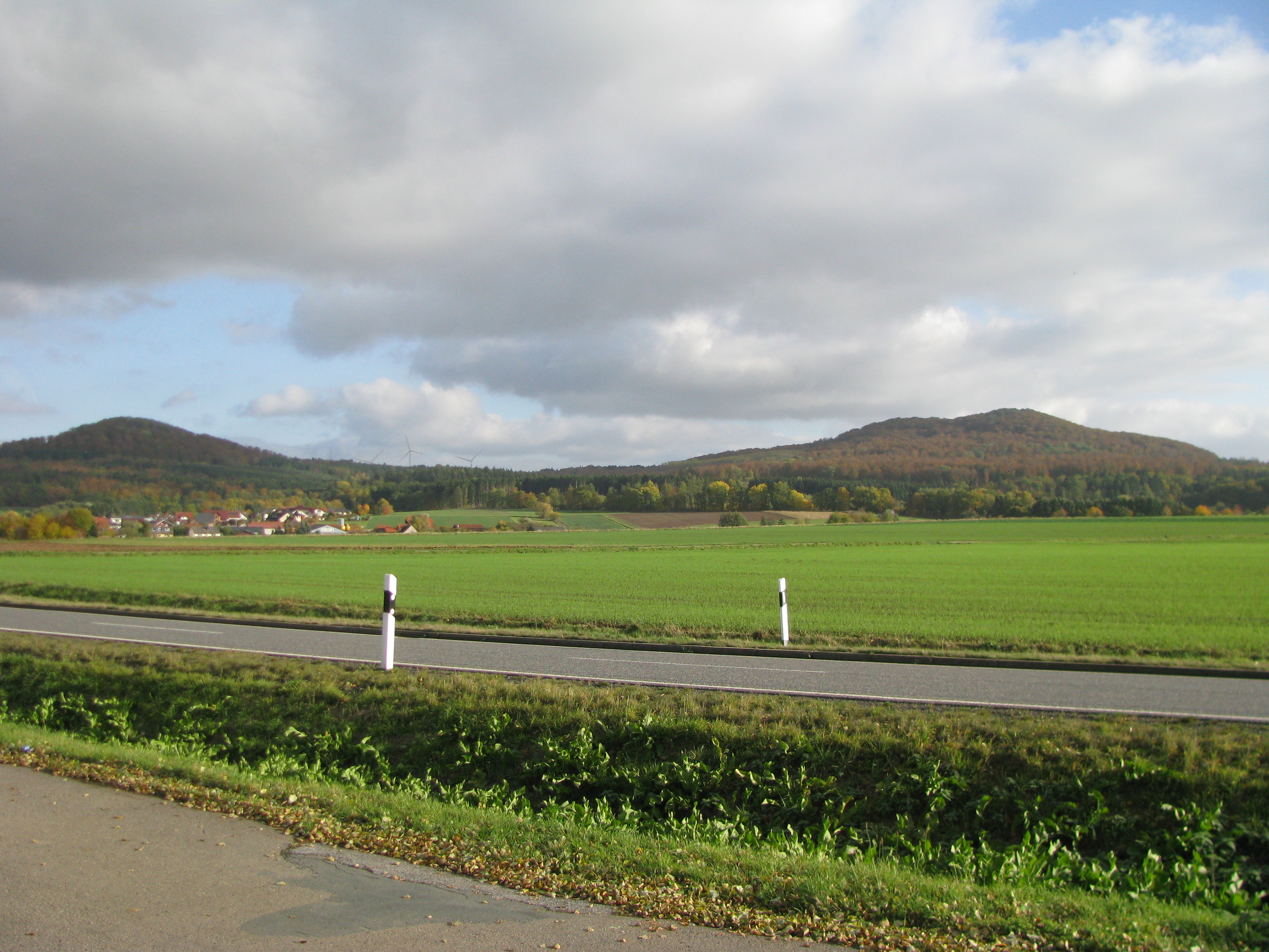 links der Hundsberg, rechts der Wattenberg, beide als Teil des FFH-Gebiets 4621-303 Wattenberg/Hundsberg bei Oelshausen